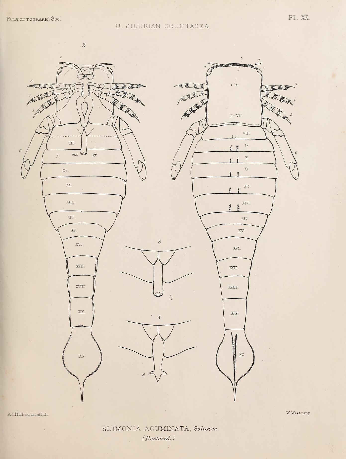 Pa L&ON T OQRAPH 1, SoC . PI. XX. U. SILURIAN CRUSTACEA. 2 ATHollick,deletlitli WWest'imj SLIMONIA ACUMINATA, SaJttr.sv- (Restored,.)